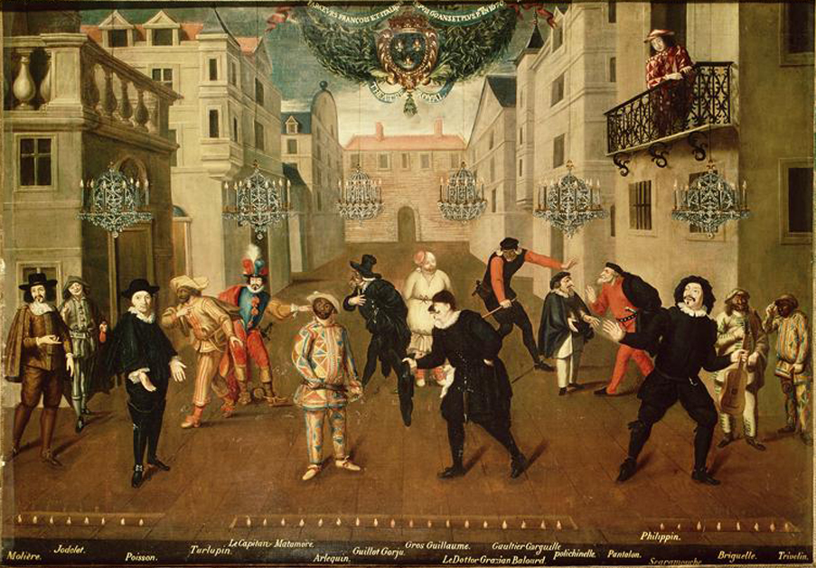 De gauche à droite : Molière dans le costume d'Arnolphe, Jodelet, Poisson, Turlupin, Le Capitan Matamore, Arlequin, Guillot Gorju, Gros Guillaume, Le Dottor Grazian Balourd, Gaultier Garguille, Polichinelle, Pantalon, Philippin, Scaramouche, Briguelle et Trivelin.